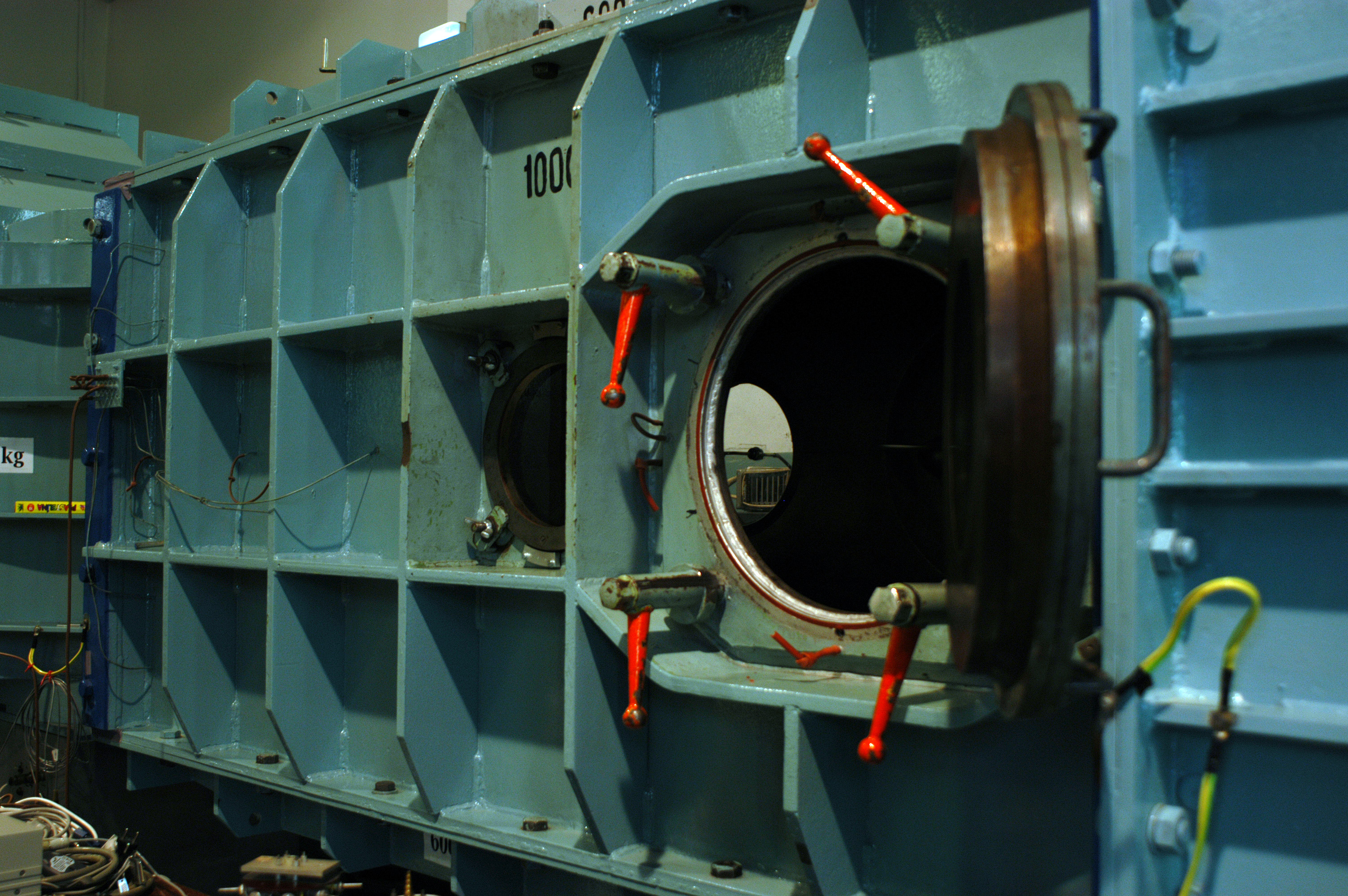 Největší vysokorychlostní aerodynamický tunel v ČR u Libeňského plynojemu.